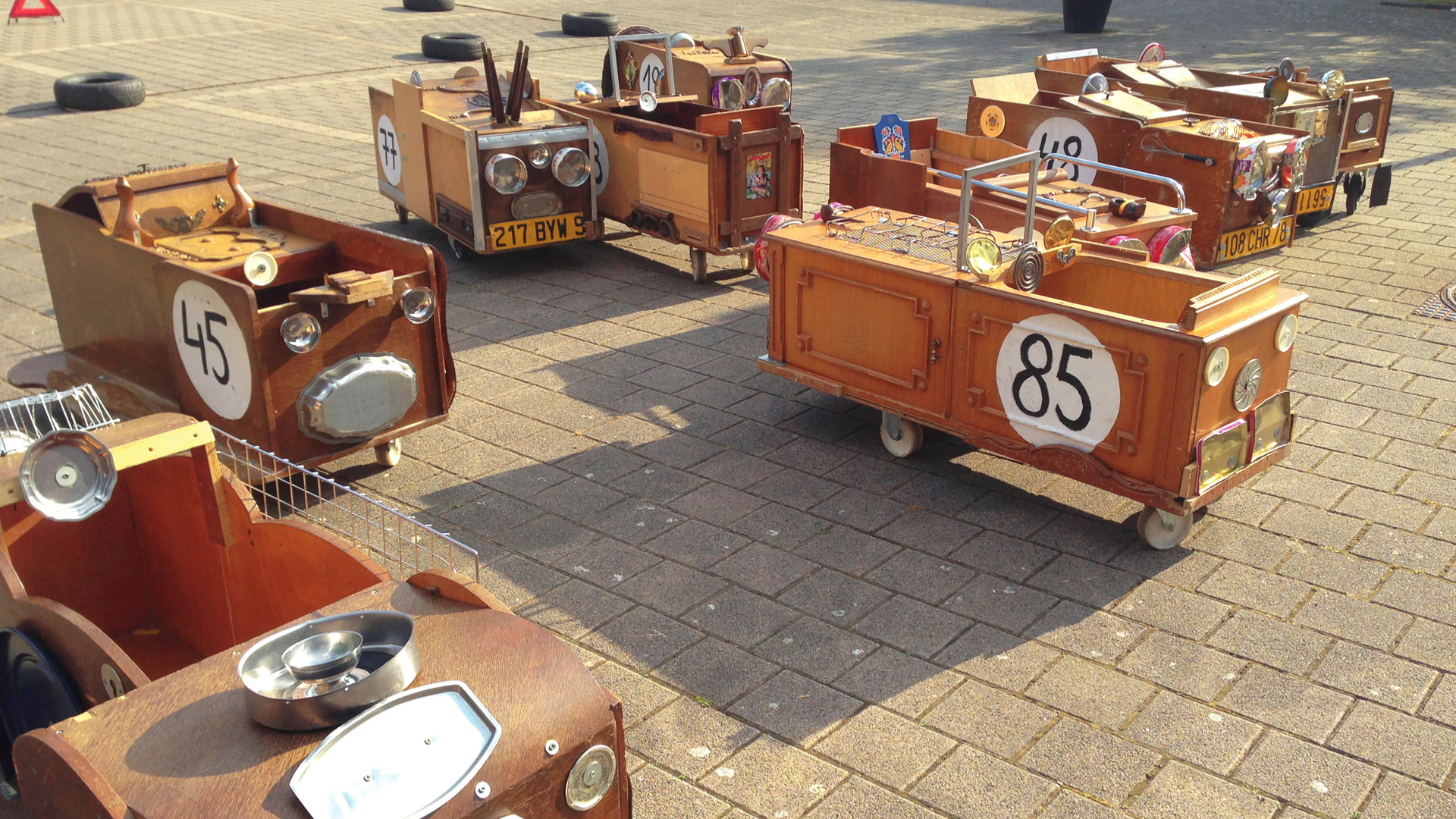 Beeld van de autorenbaan.